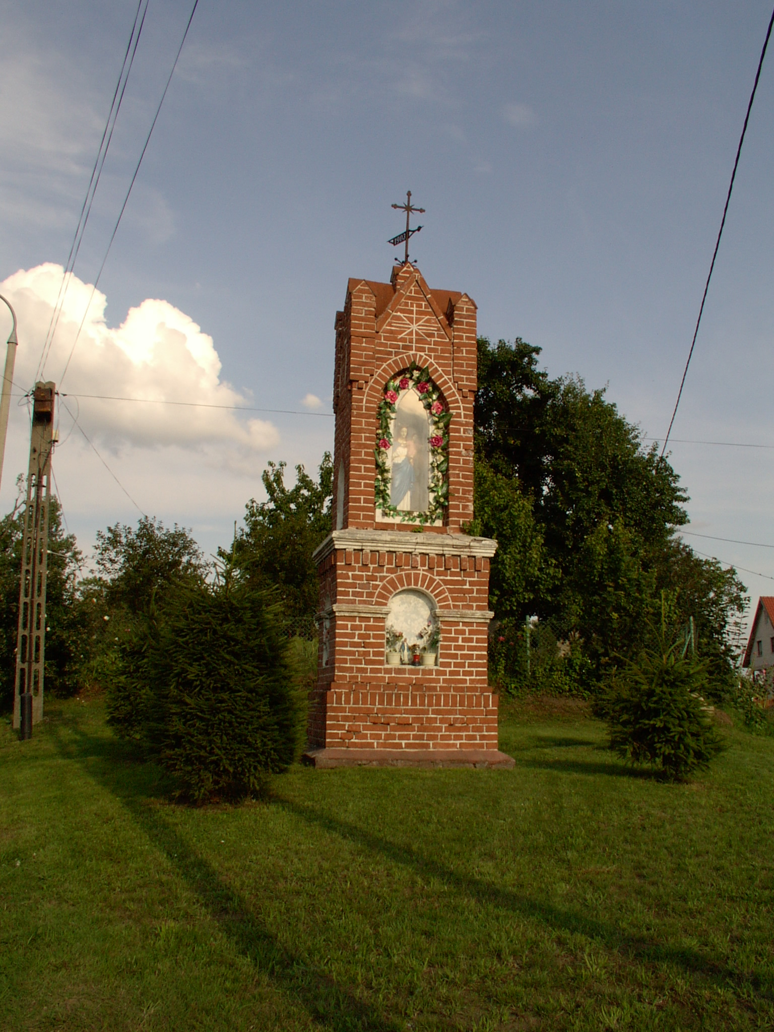 Przydrożna kapliczka w Gutkowie, Olsztyn